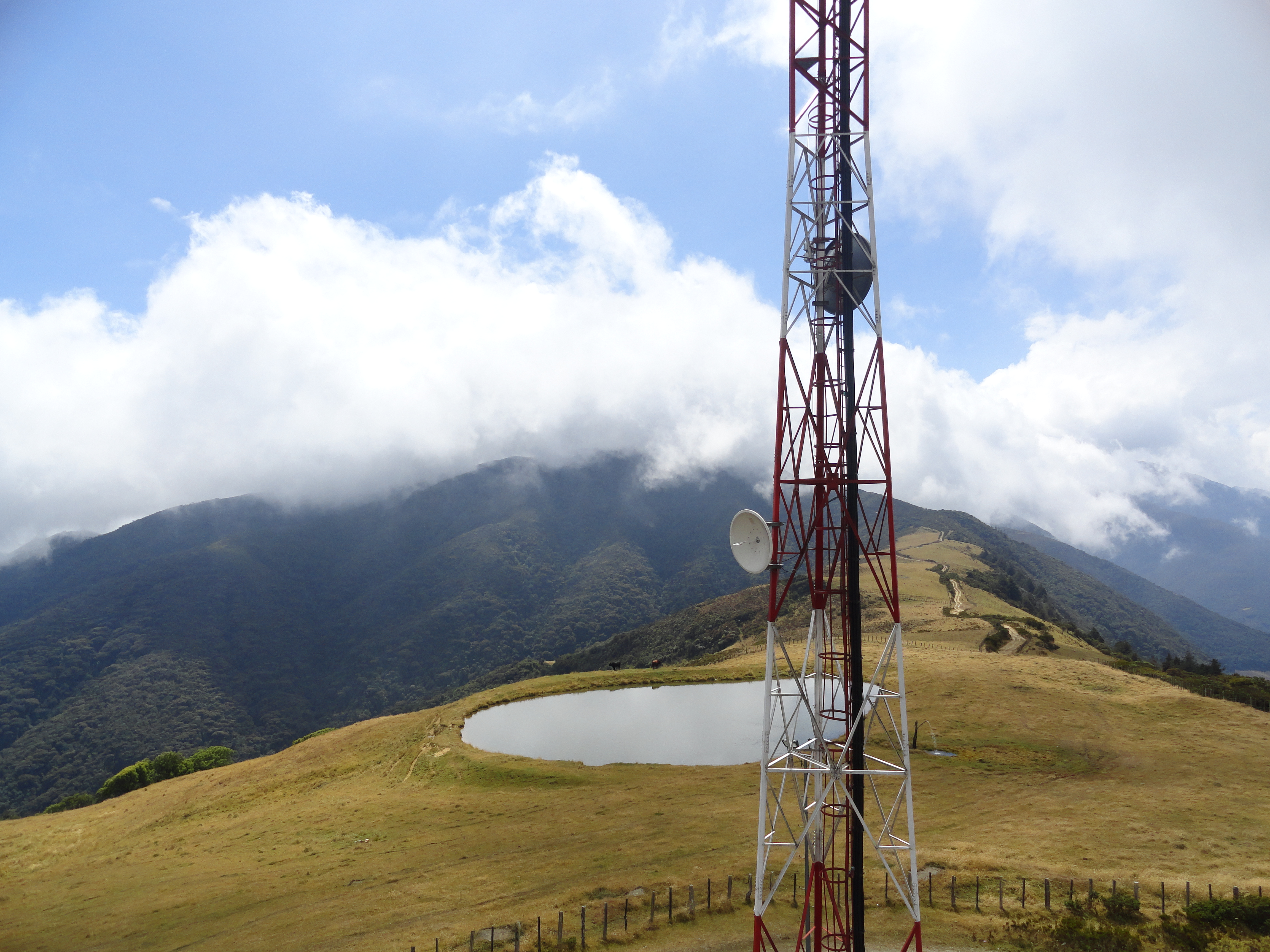 Foto desde una de las Antenas Radiales abandonadas en el comienzo del camino hacia la laguna La Grande, en el Parque Nacional Juan Pablo Peñaloza. Estado Táchira.